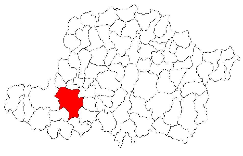 Categorie:Hărţi ale judeţului Arad